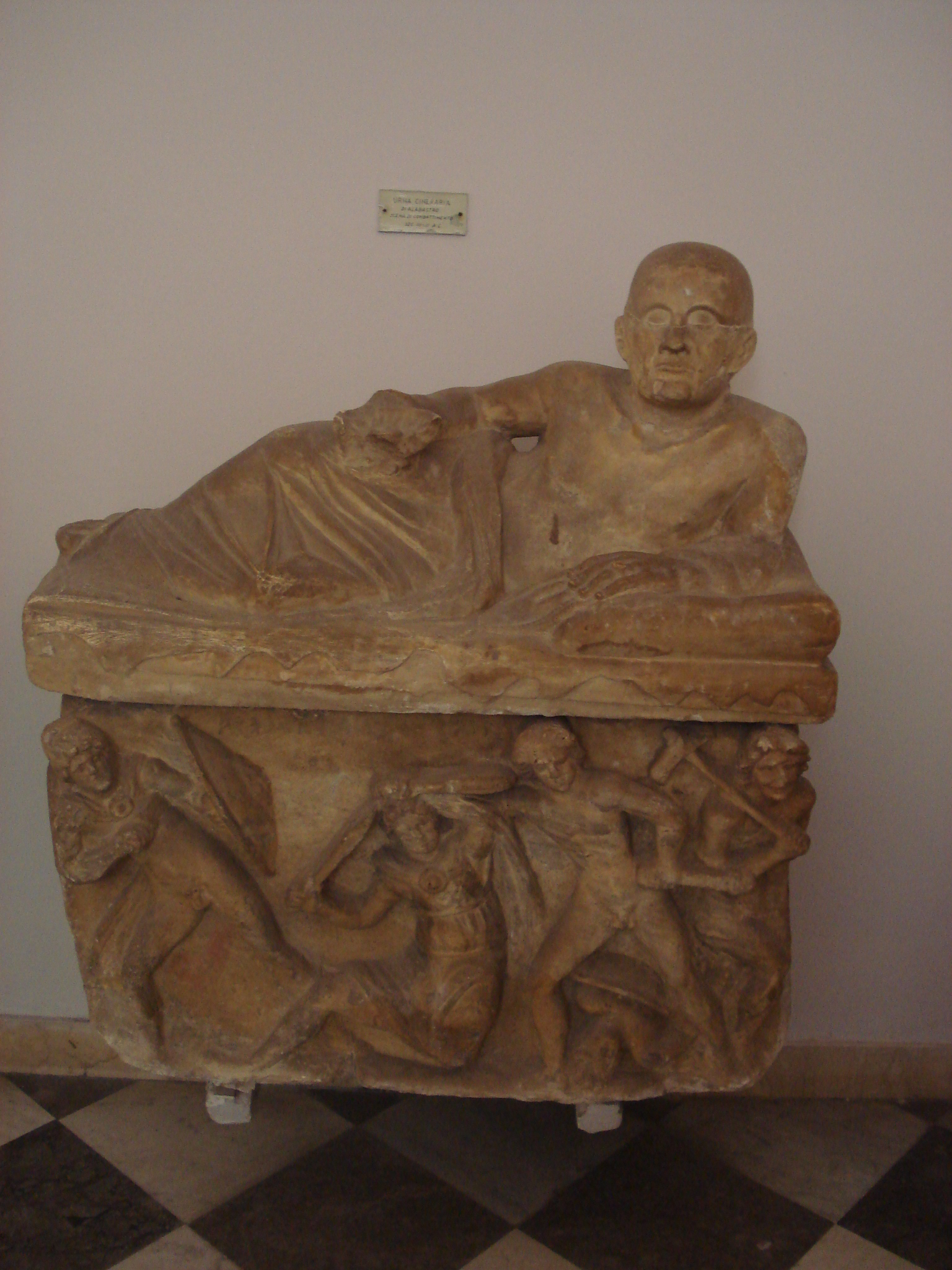 Urna cineraria etrusca, in alabastro. Museo archeologico regionale di Palermo. Foto di Giovanni Dall'Orto, 28 settembre 2006.